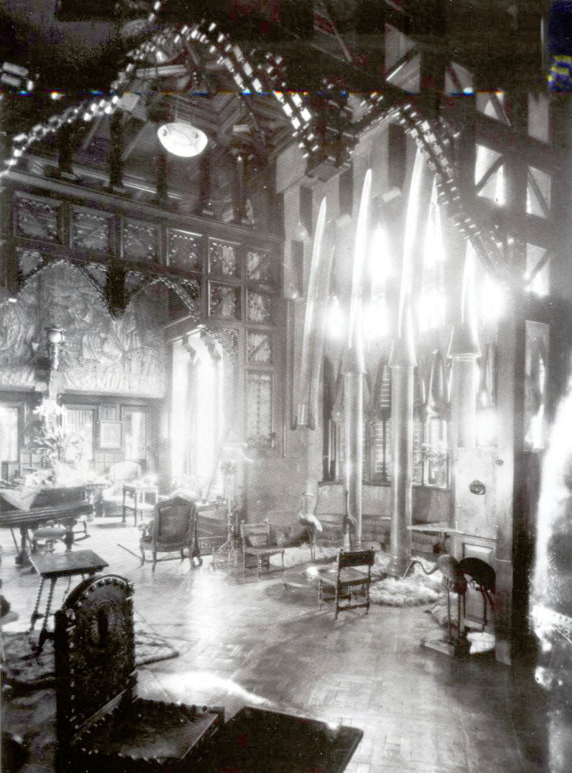 Sala de Confianza del Palacio Güell.